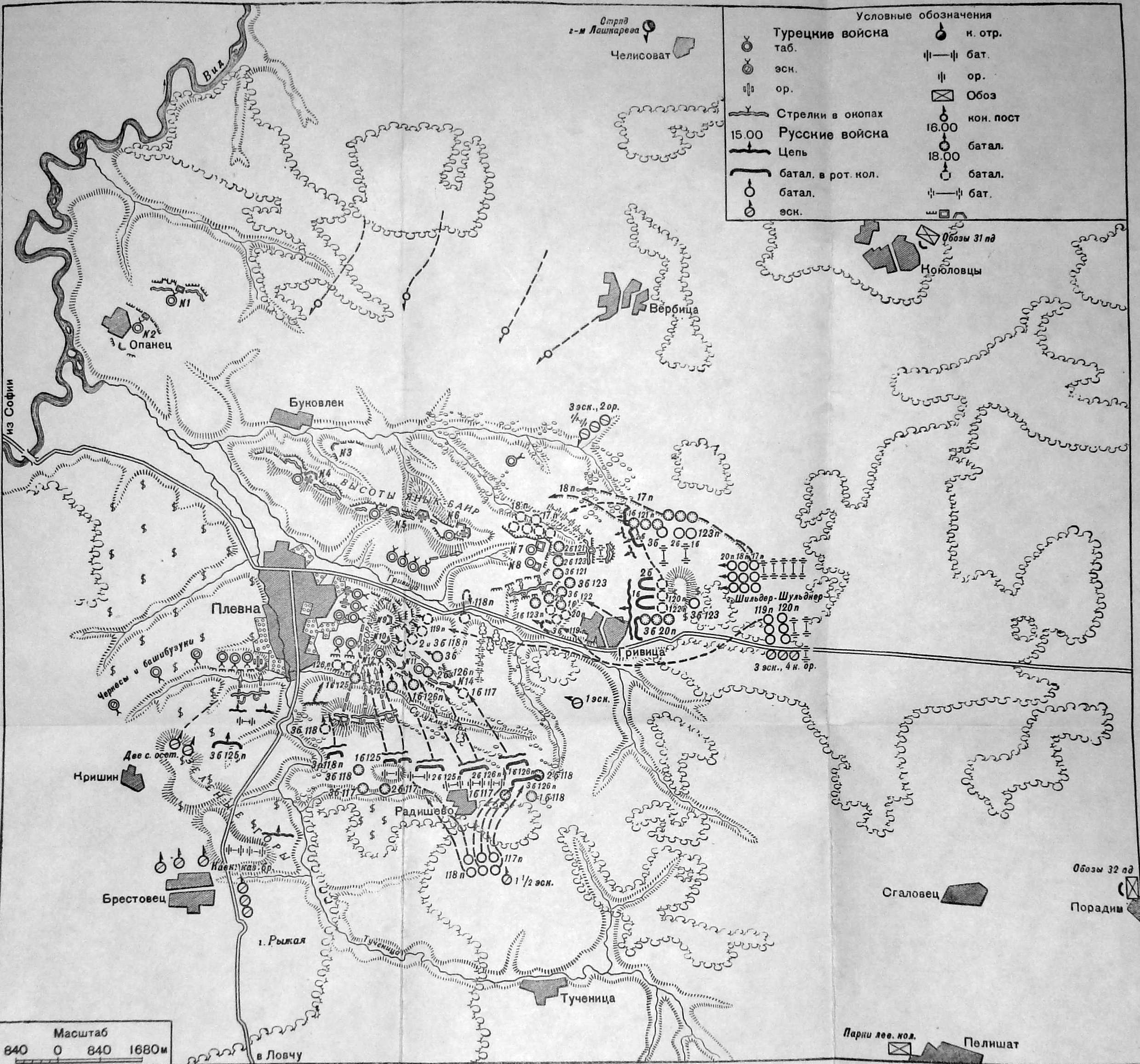 Карта на втората атака на Плевен - 18 (30) юли 1877 г.